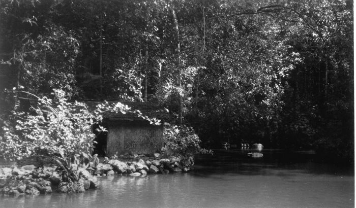 Foto. Badplaats Darma in het districht Kuningan op West Java